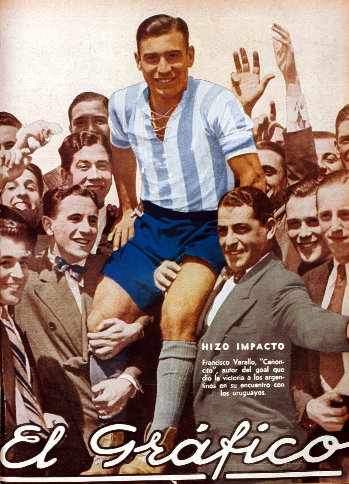 El Grafico del 30 de Diciembre de 1933. Edicion 755